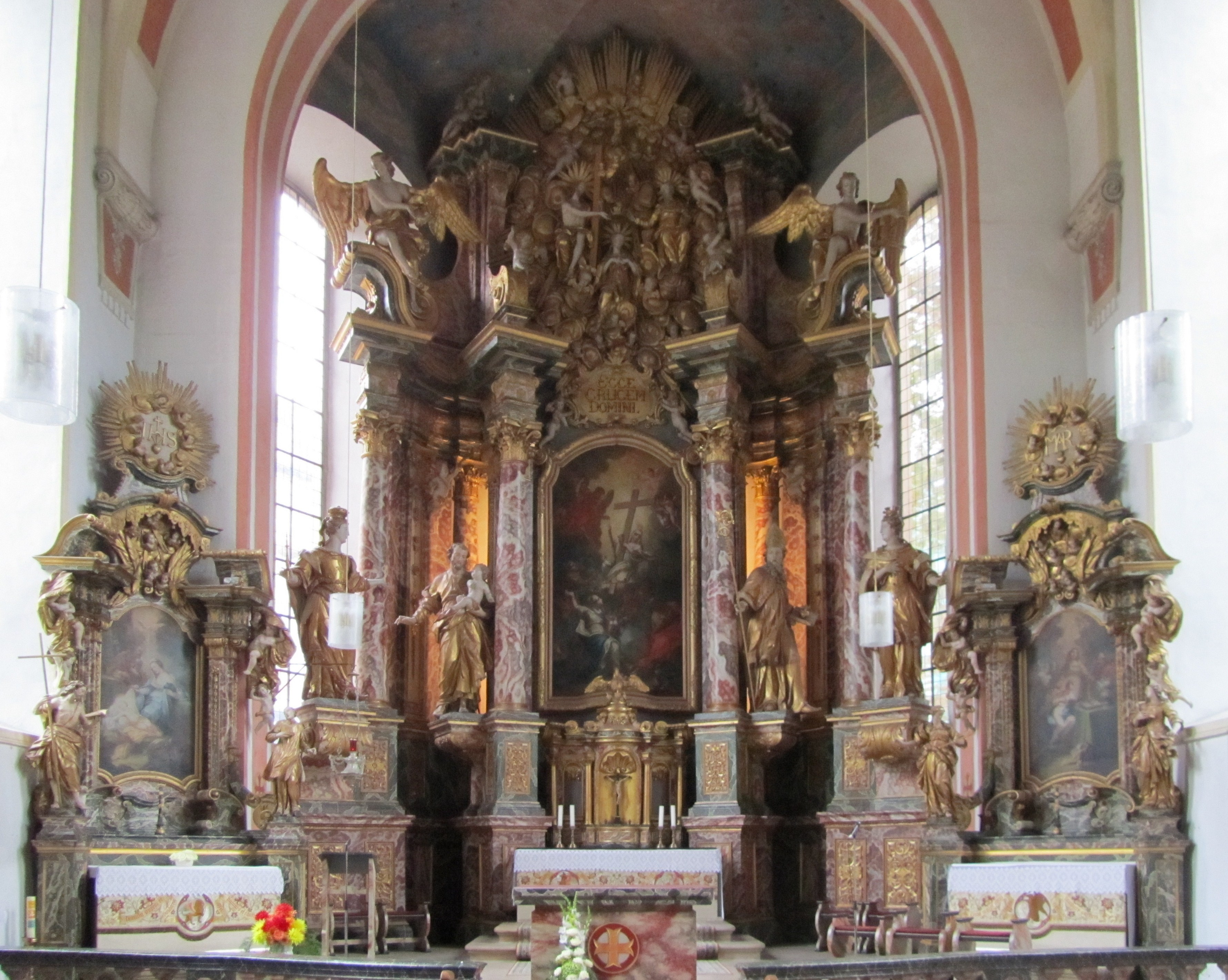 Der Altarraum der Cruciskirche/Neuwerkskirche in Erfurt.